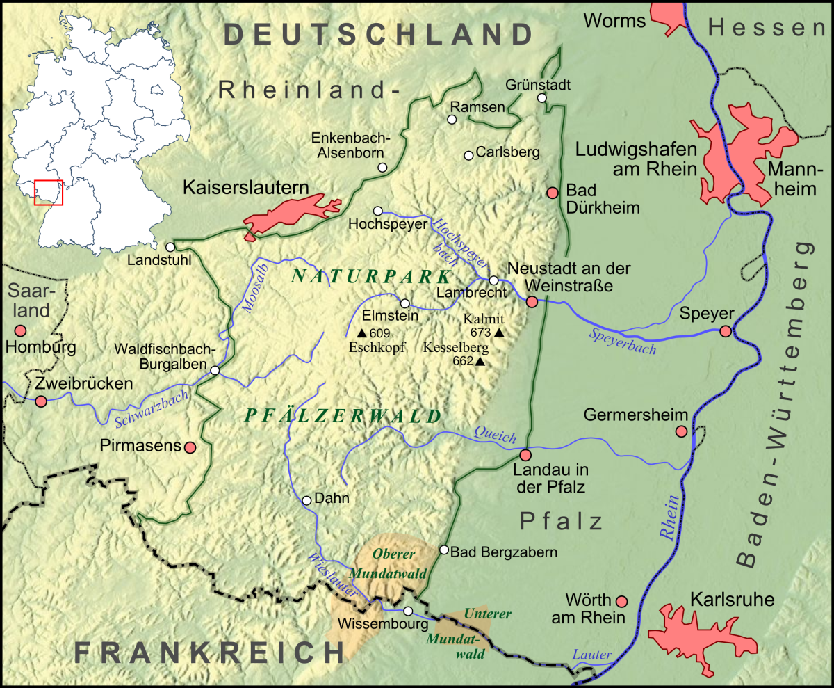 Lage des Oberen und Unteren Mundatwaldes